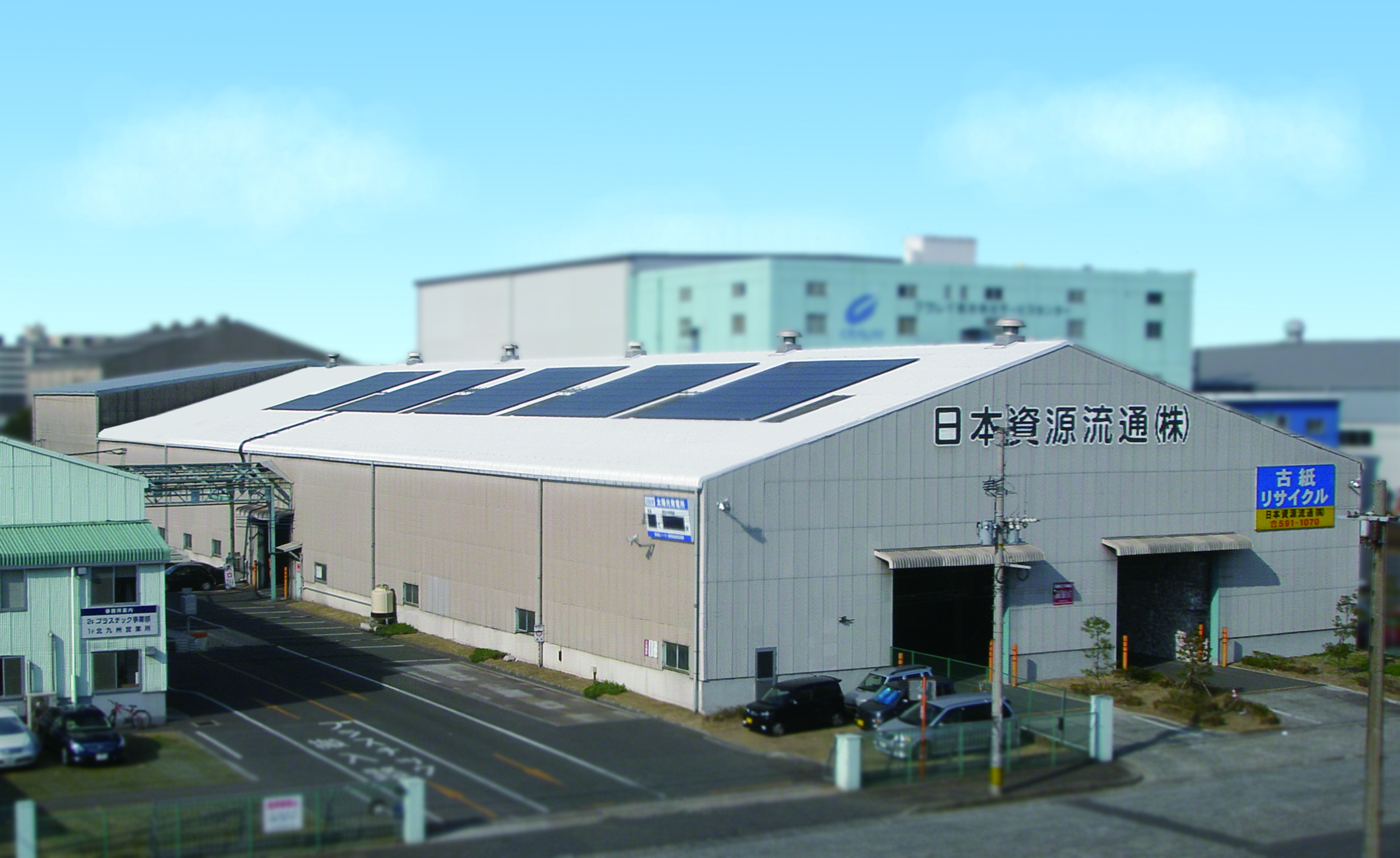 日本資源流通の本社写真